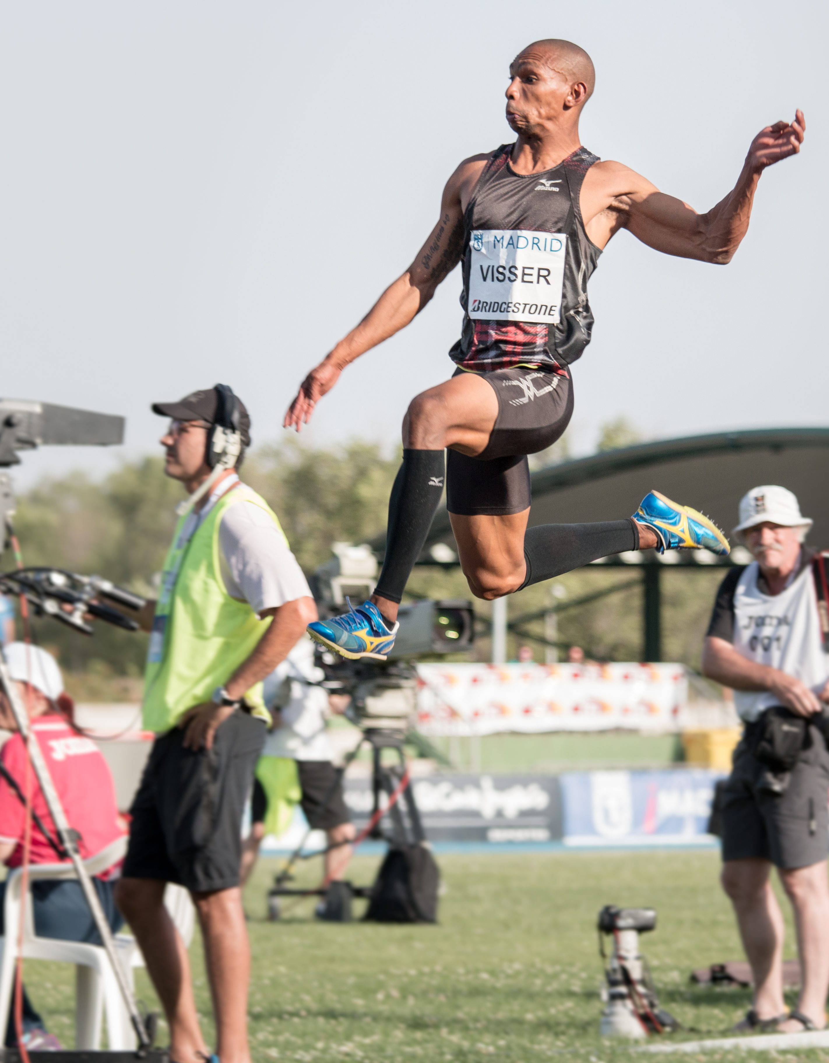 Zarck Visser (RSA). Salto en largo. IAAF World Challenge. Meeting Madrid 2017. Moratalaz, Madrid.